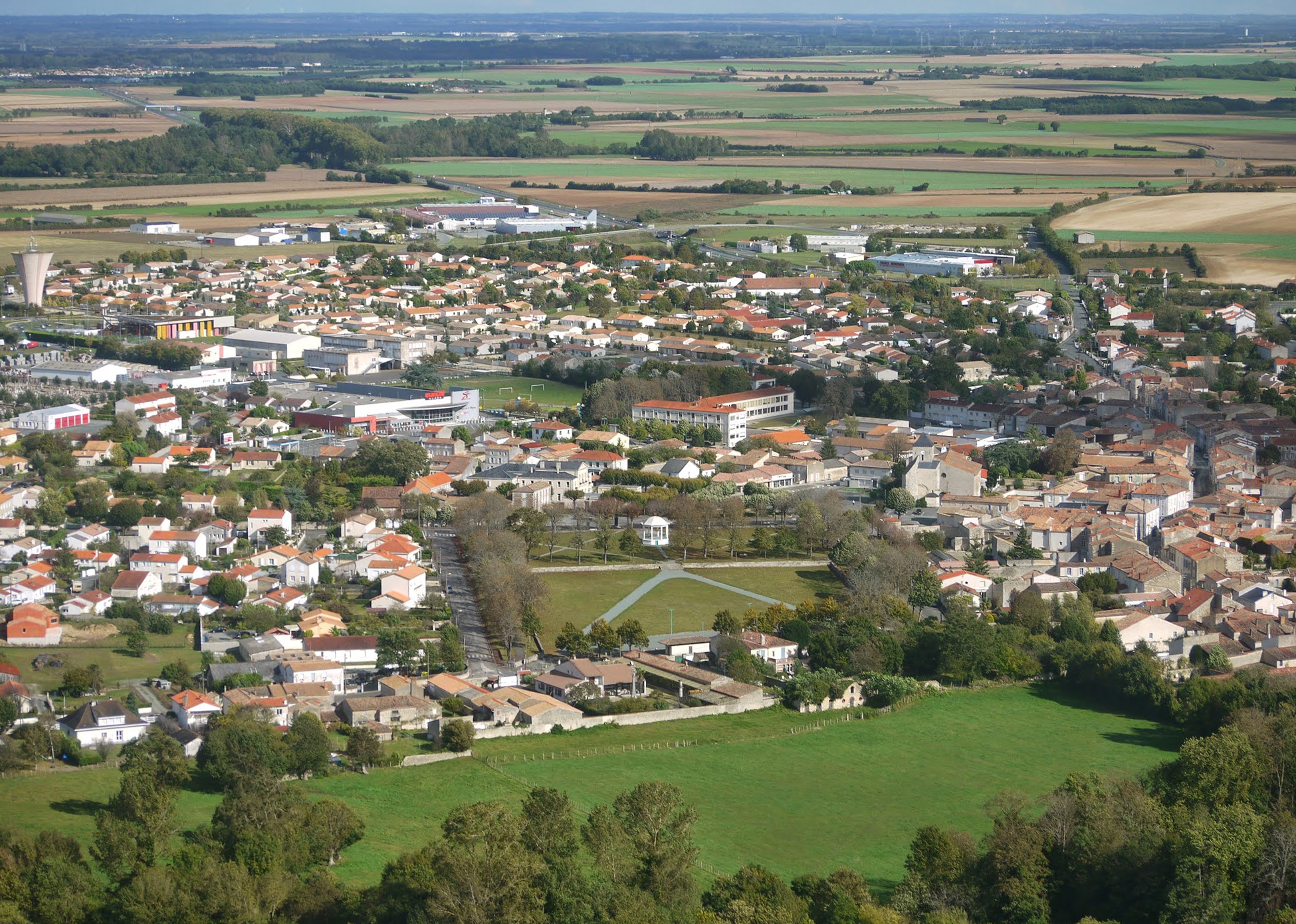 Vue aérienne de Mauzé sur le Mignon avec le champ de foire et le kiosque à musique au premier plan.